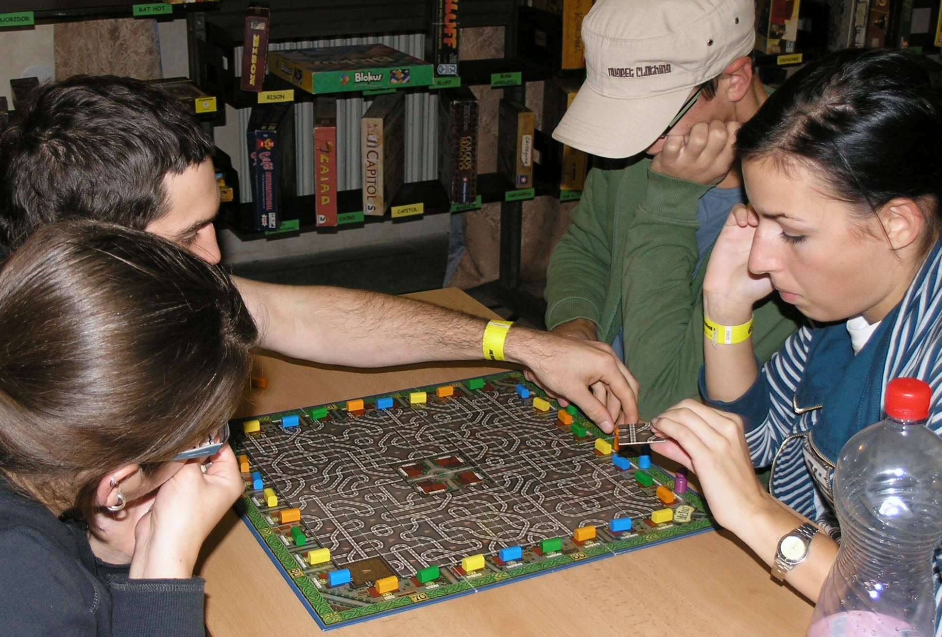 Deskohraní 2008